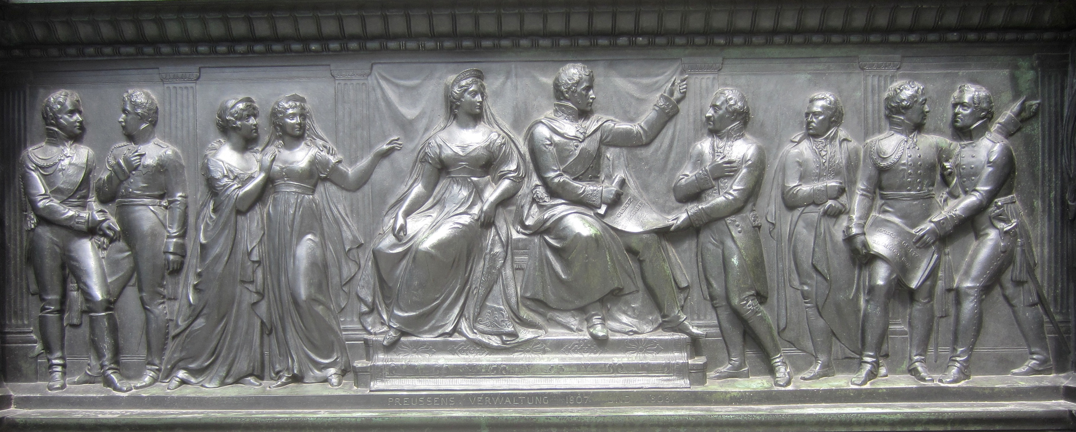 Friedrich Wilhelm III. und Königin Luise in Ostpreußen bei den Verwaltungsreformen von 1807/08 (mit den Reformern Stein, Hardenberg, Scharnhorst und Gneisenau und Mitgliedern der königlichen Familie, z.B. Bruder Prinz Wilhelm und dessen Gattin, Prinzessin Marianne); Relief am Denkmal für den Freiherrn vom Stein von Hermann Schievelbein und Hugo Hagen in Berlin vor dem Abgeordnetenhaus